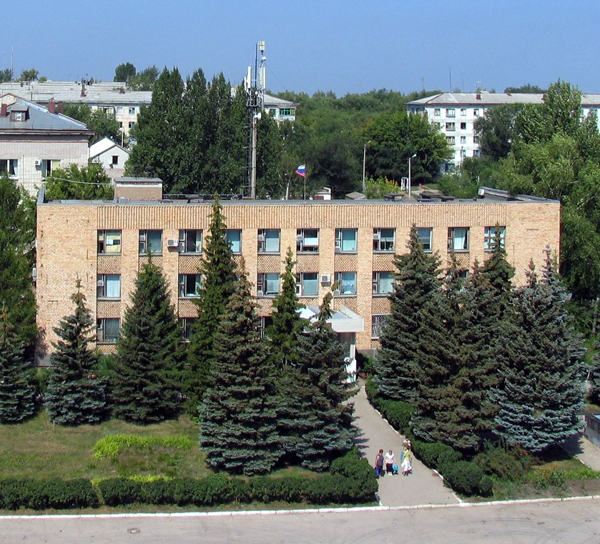 Администрация м.р. Нефтегорский